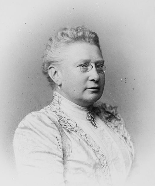 Duchess Vera of Wurtemberg